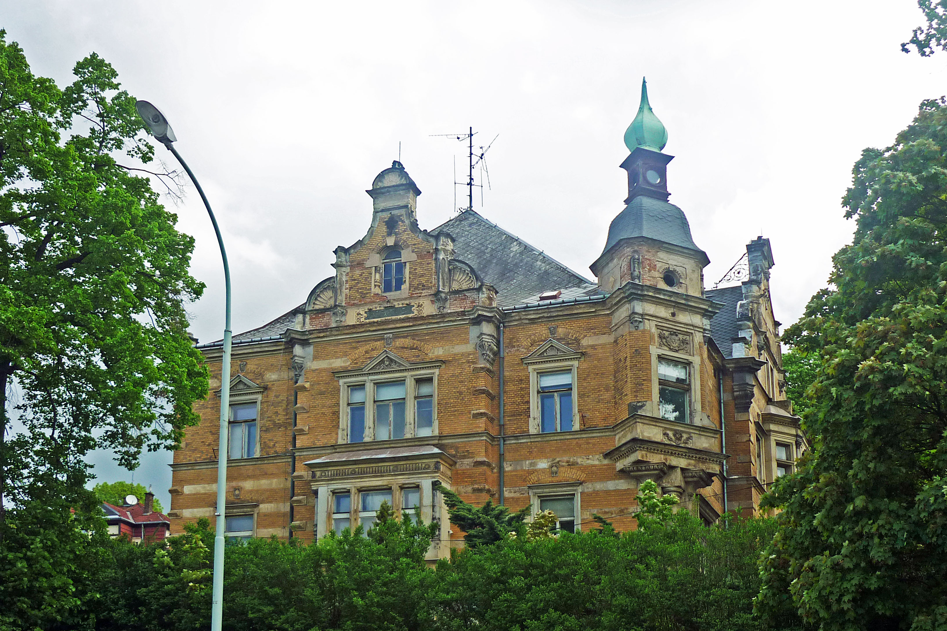 Villa Winston-Churchill-Str. 8 in Ústí nad Labem (Aussig) von Hans Miksch